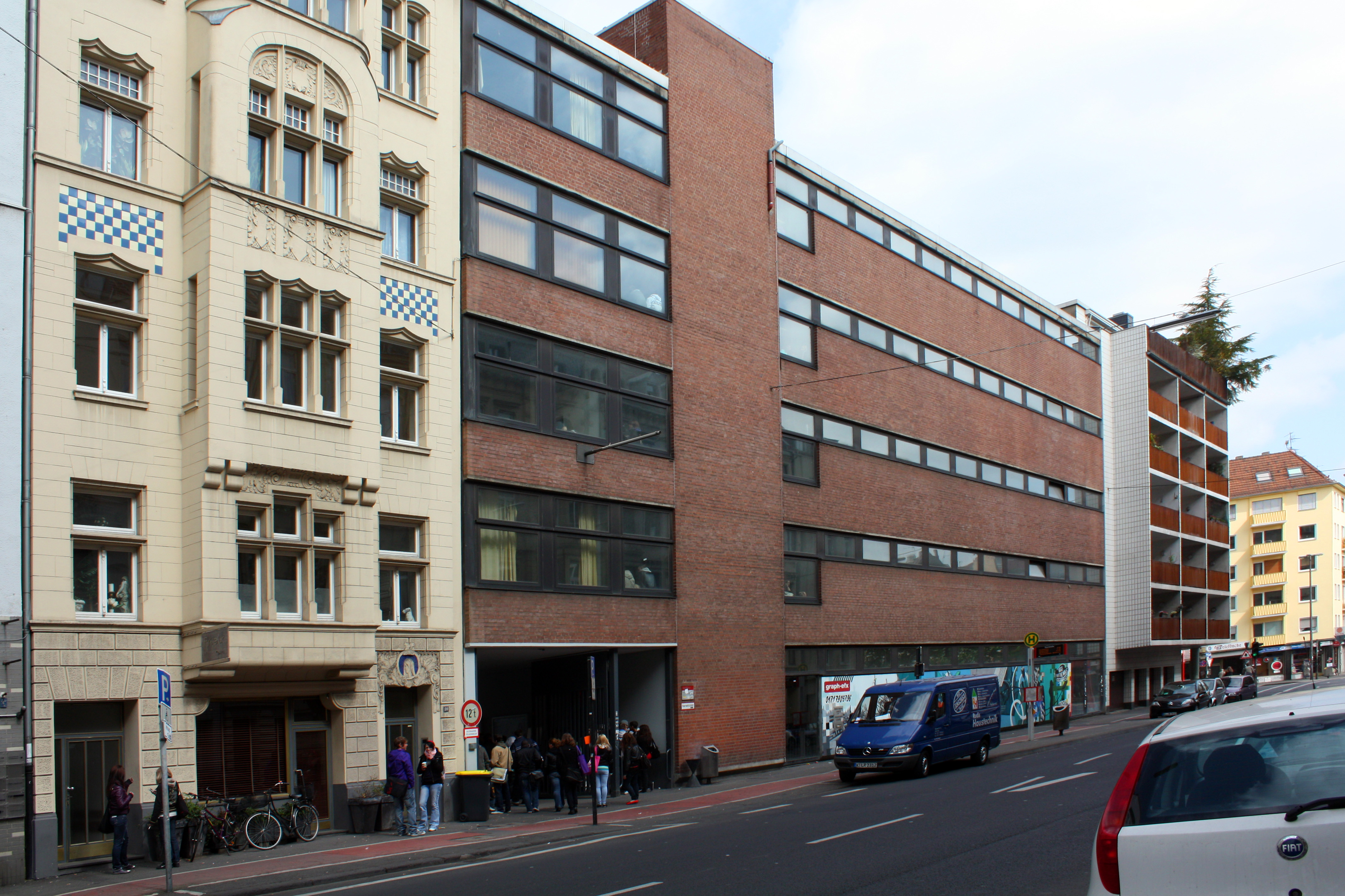 Berufskolleg, Köln- Lindenstraße 78